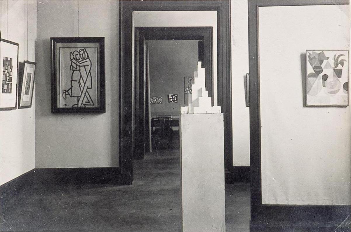 Theo van Doesburg. Overzichttentoonstelling Theo van Doesburg, Landesmuseum, Weimar. 1923. Foto. 11,5 × 17,4 cm. Instituut Collectie Nederland (inv.nr. AB5300).